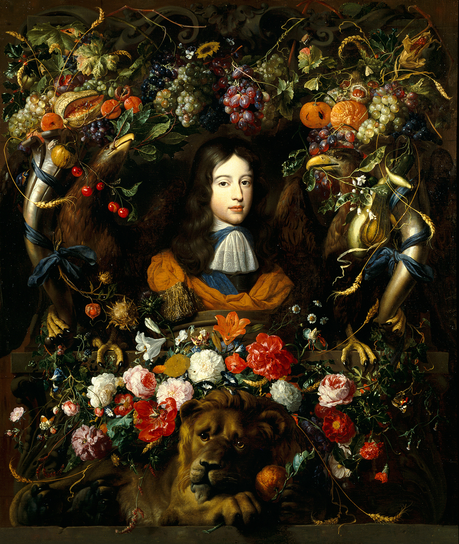 Le prince Guillaume III d'Orange peint ici à l'âge d'environ 10 ans.